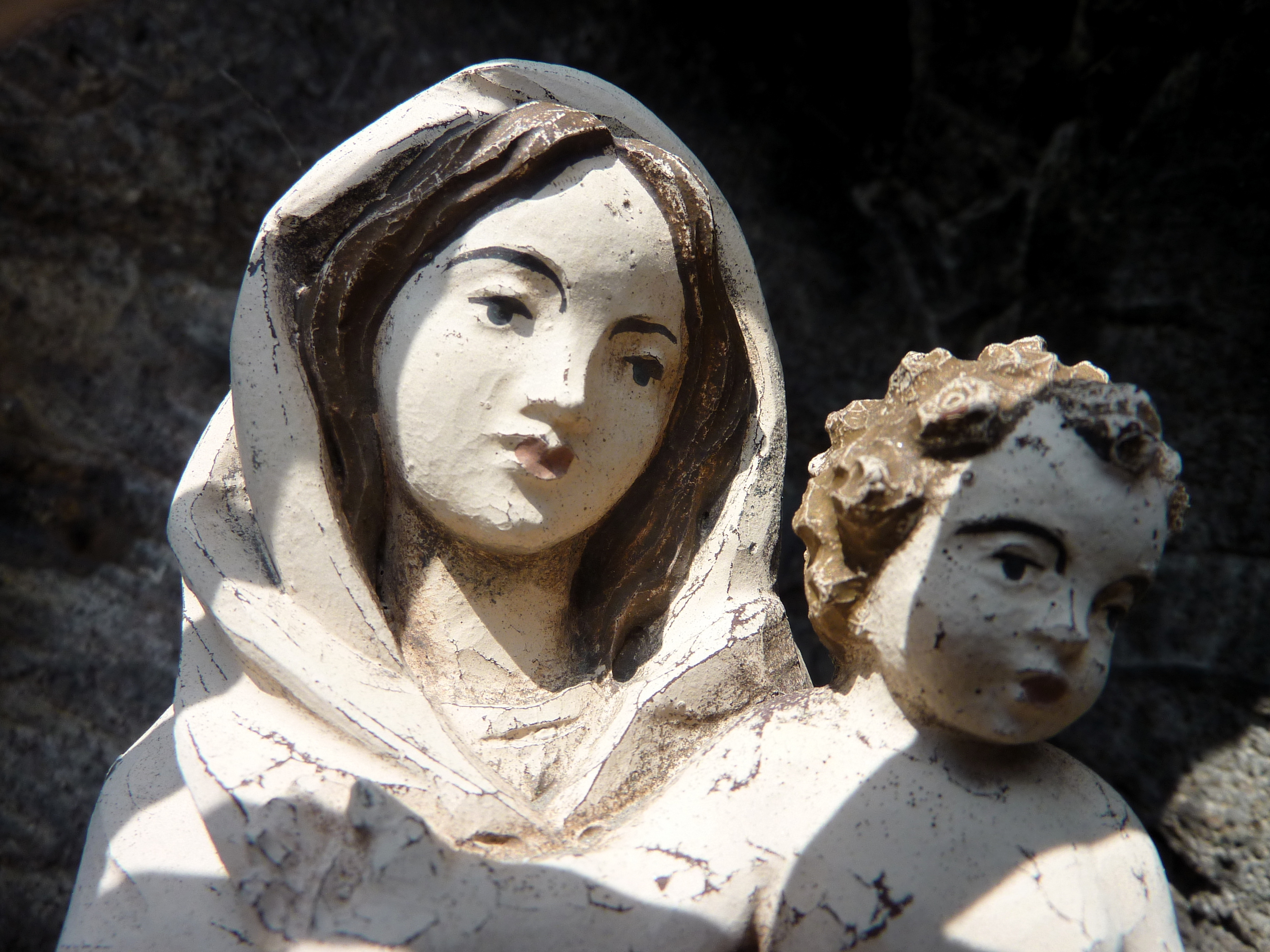 Madonnenfigur im Bildstock am Alten Zollhaus an der Friedberger Landstraße über den Berger Rücken in Frankfurt am Main. Dieser Bildstock gab dem angrenzenden Hochplateau-Gelände den Flurnamen Heiligenstock.